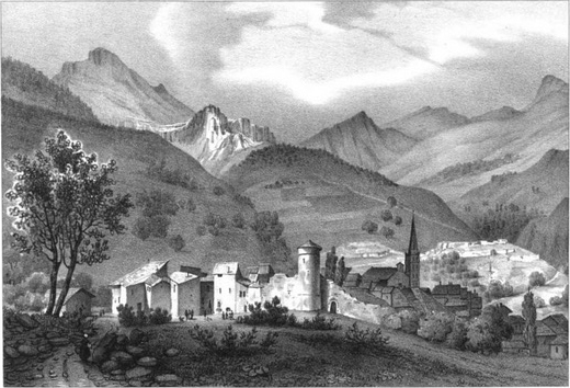 Guillestre